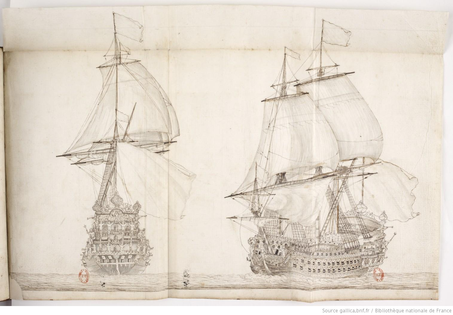 Gesamtansicht des Blattes mit Heck- und Seitenansicht von vorn